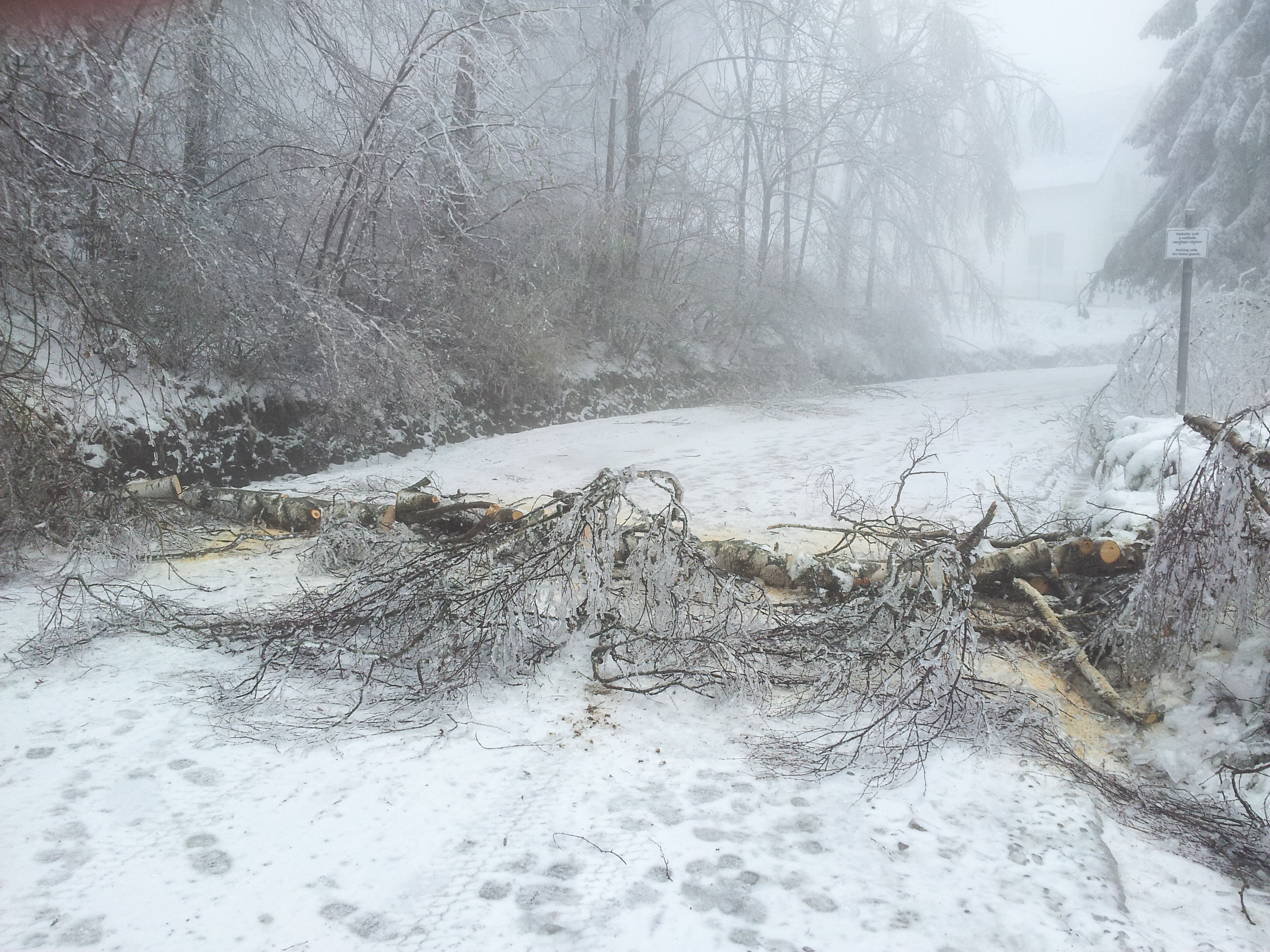 Ice damage in December 2014, Galyatető, Hungary